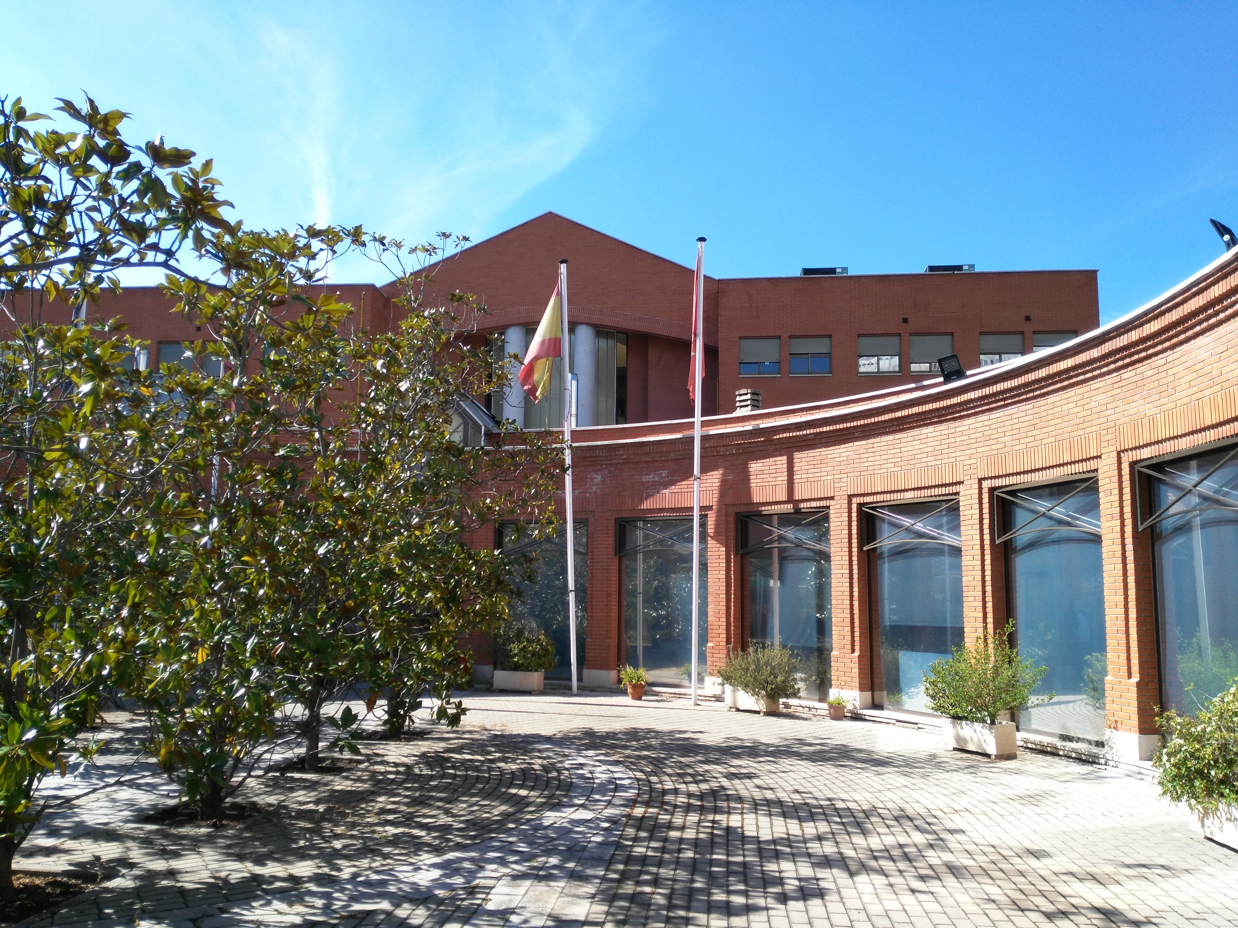 Foto Instituto Cajal